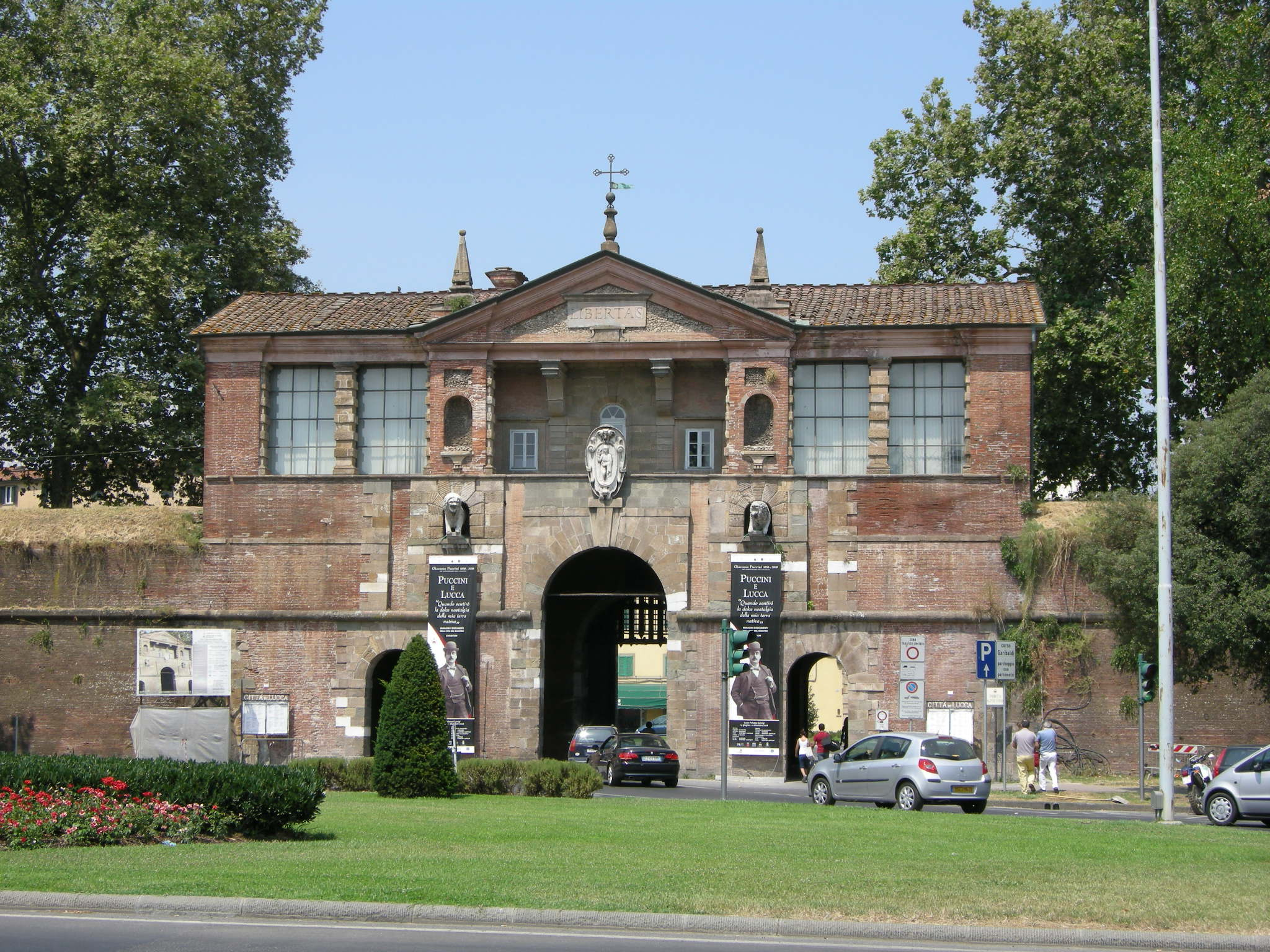 Porta san pietro, lucca